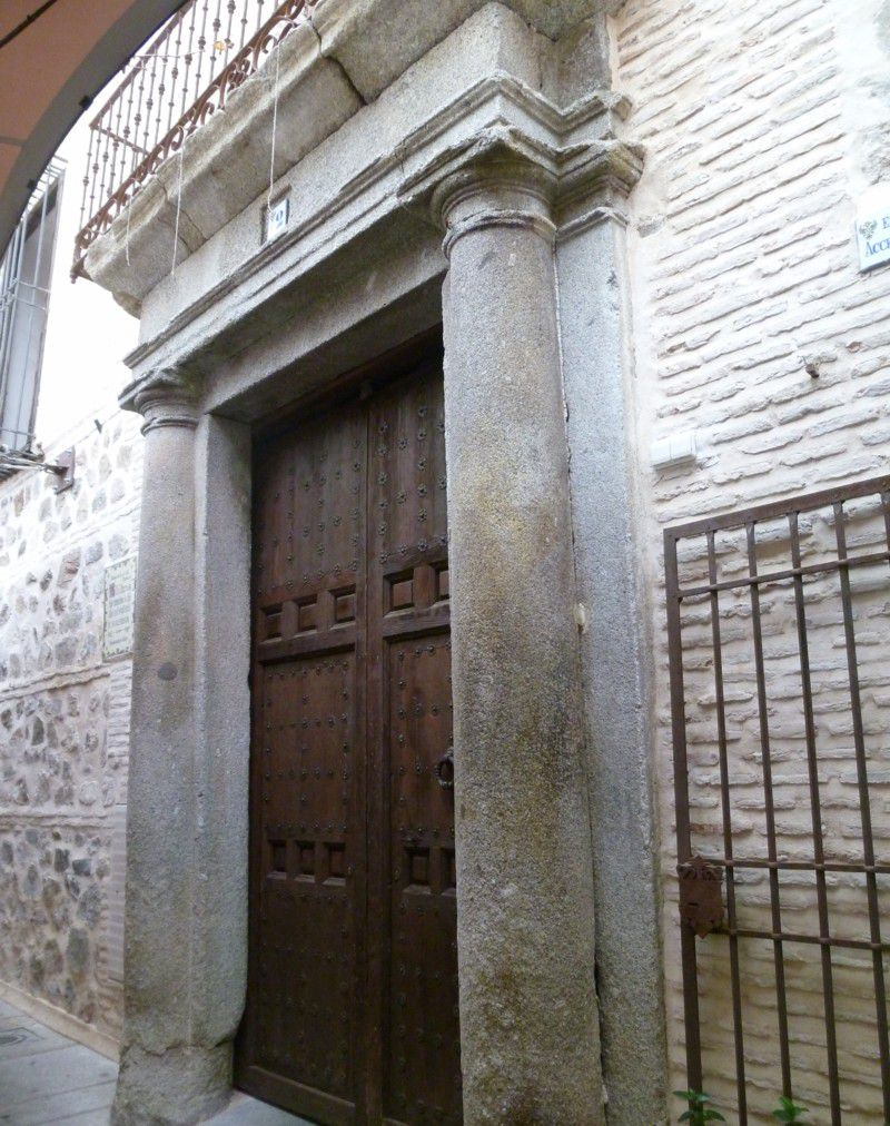 Atribuïda a Jorge Manuel Theotokópoulos, pero podría ser obra del propi Doménikos.